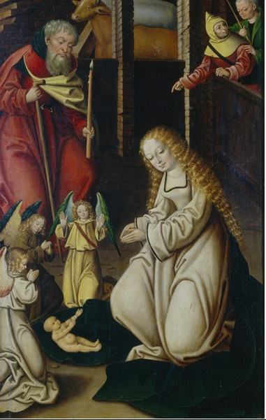 Nativite de Cappenberg